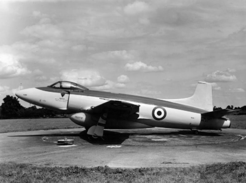 A Supermarine Attacker FB.2 in August 1952.